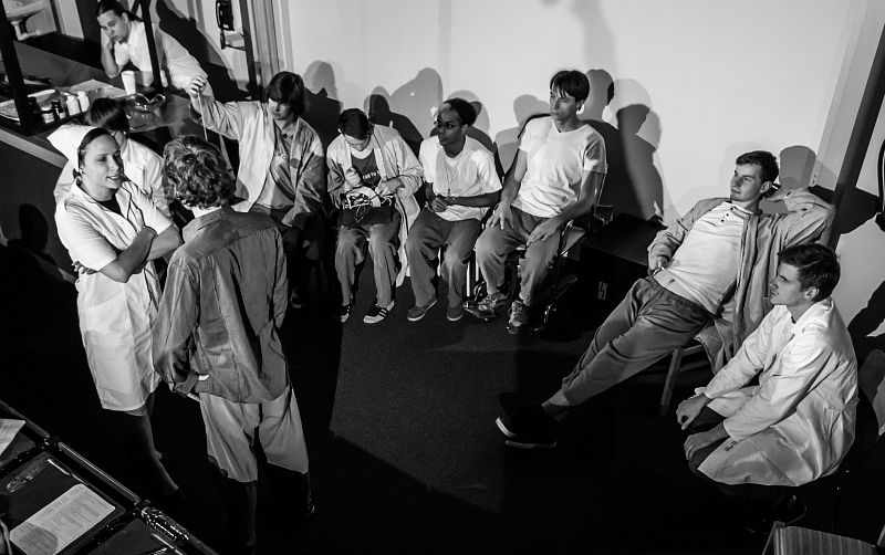 Zkouška divadelního představení Přelet nad kukaččím hnízdem